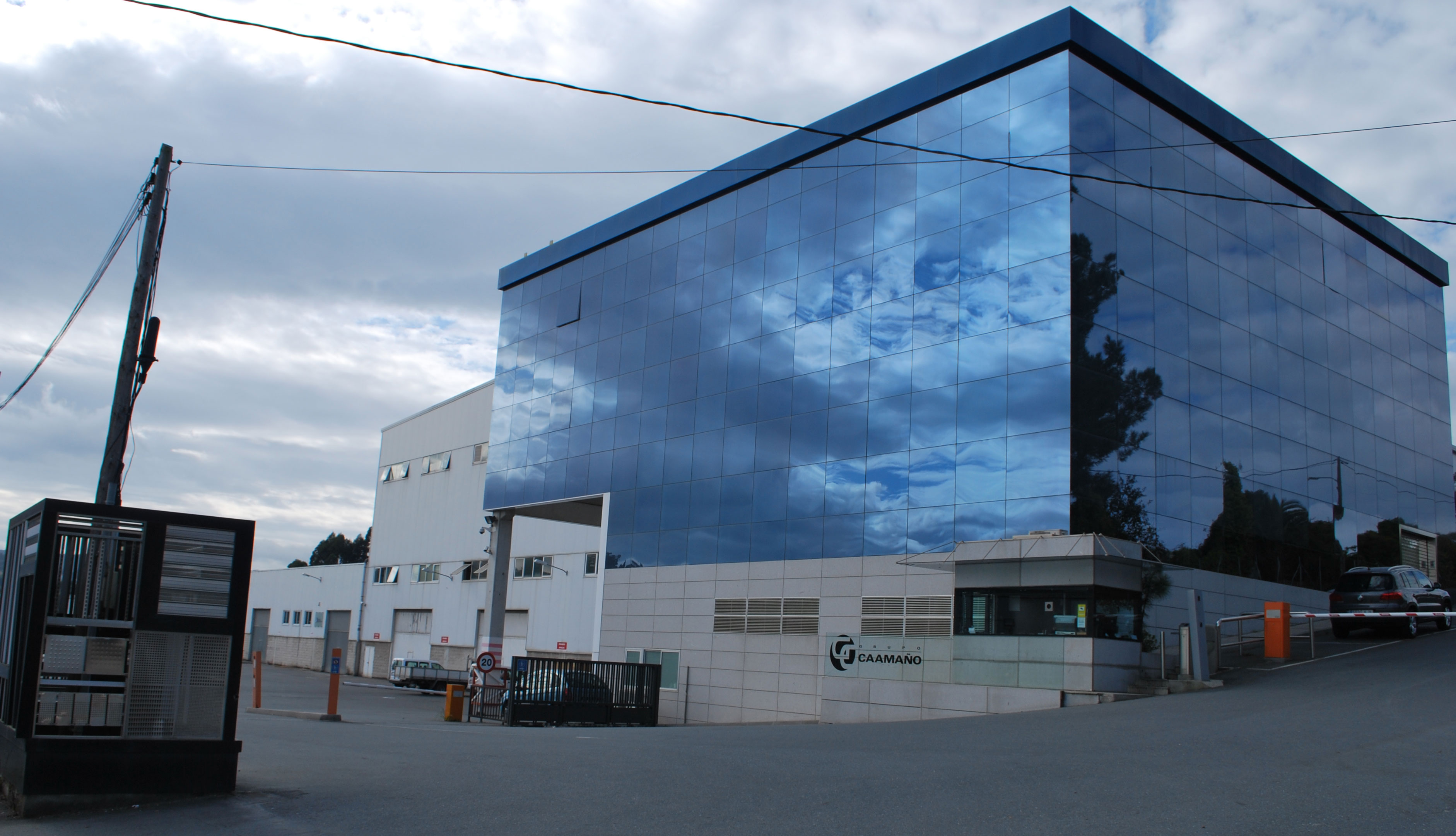 Sede de Caamaño en Alvedro Culleredo A Coruña Galiza Spain